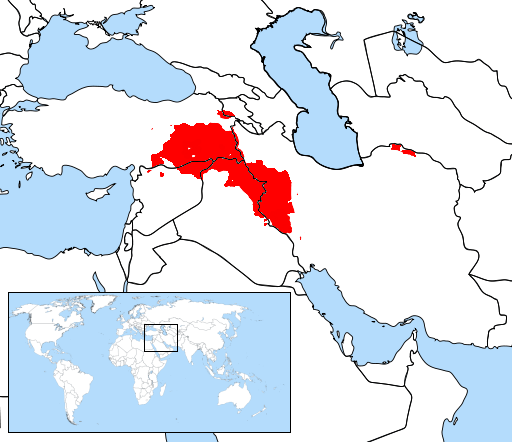 تۆرکجه: کوردلرین یاشادیغی اراضیلر.